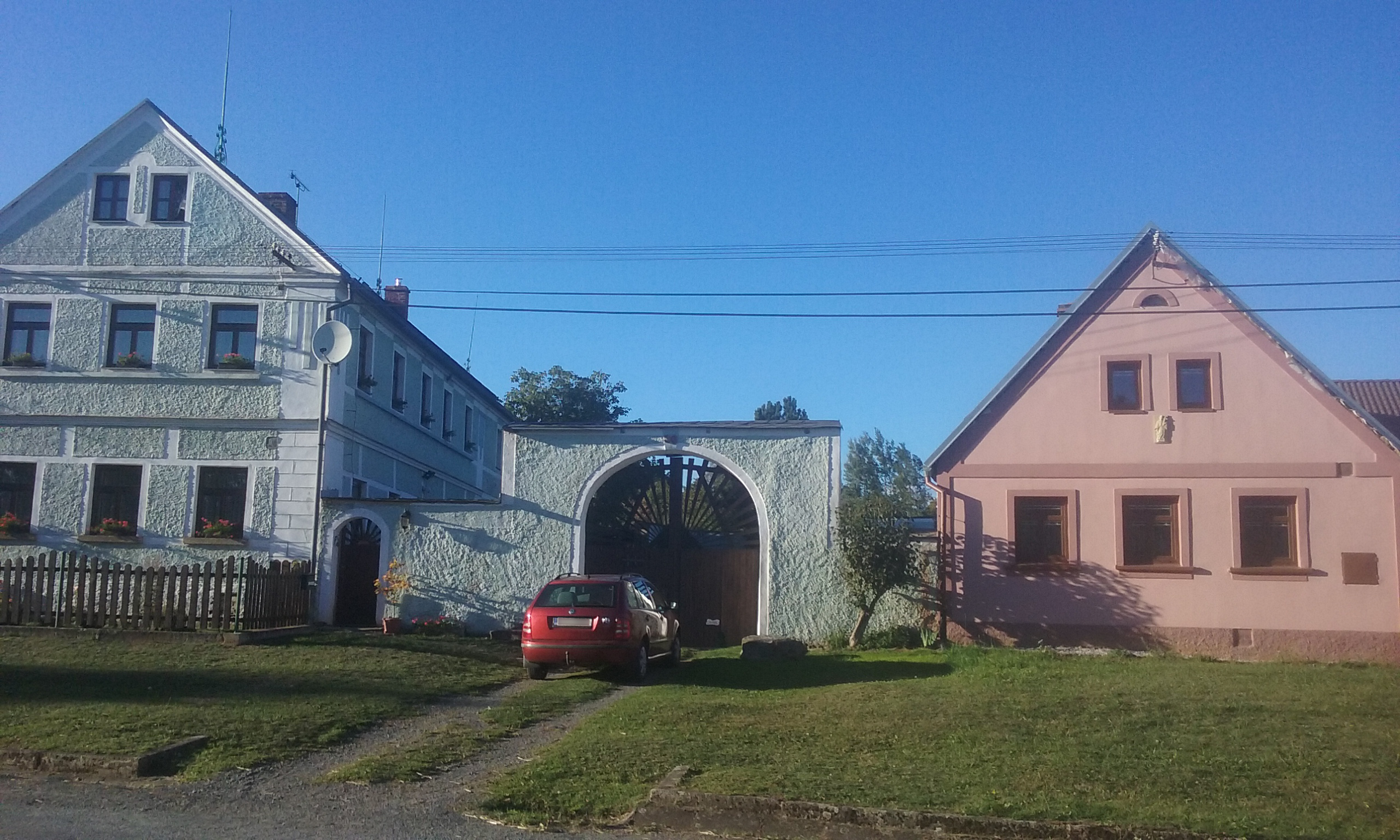 Domy v Březíně. Okres Plzeň-sever, Česká republika.